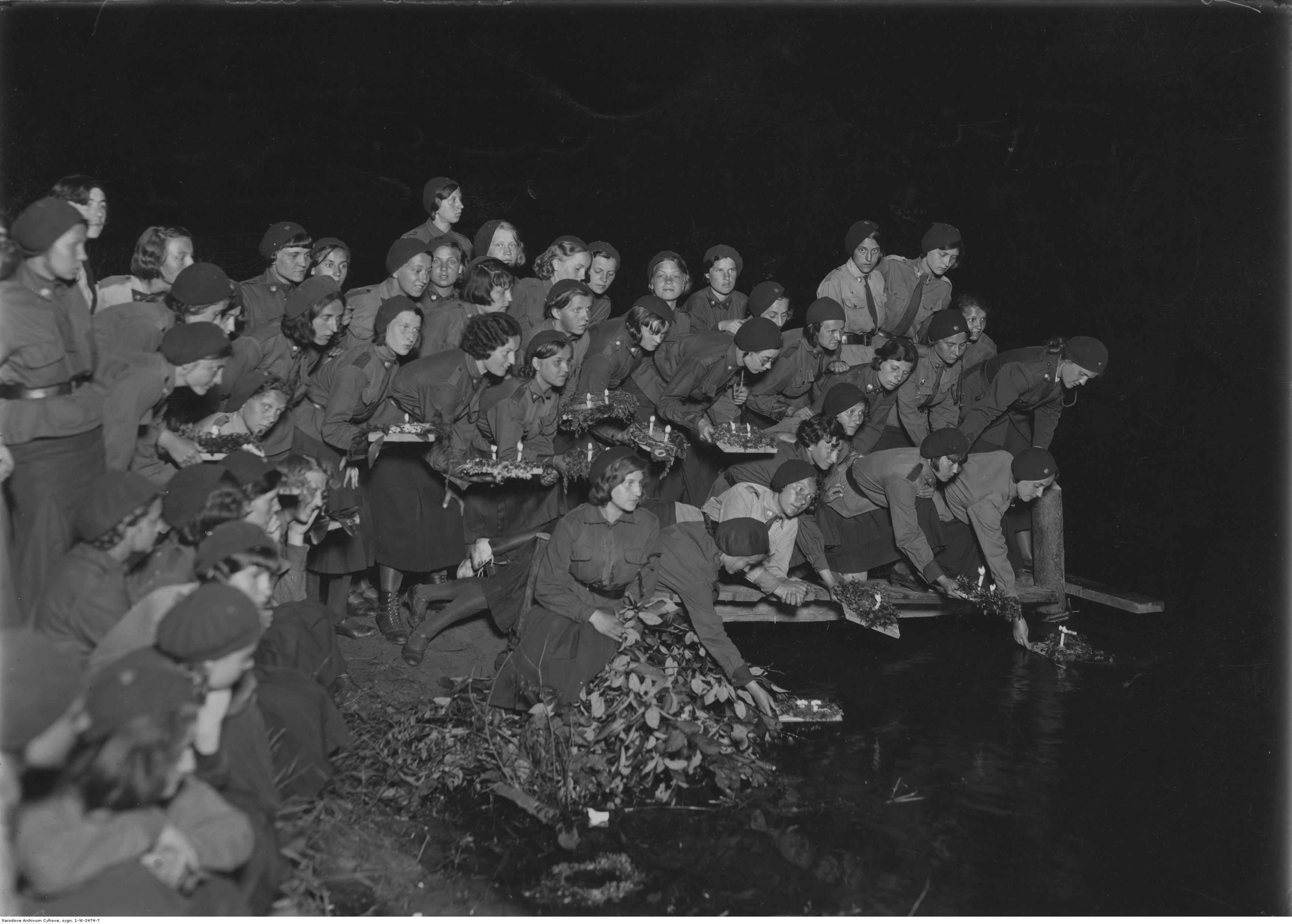 Członkinie Przysposobienia Wojskowego Kobiet puszczają wianki na Pilicy.